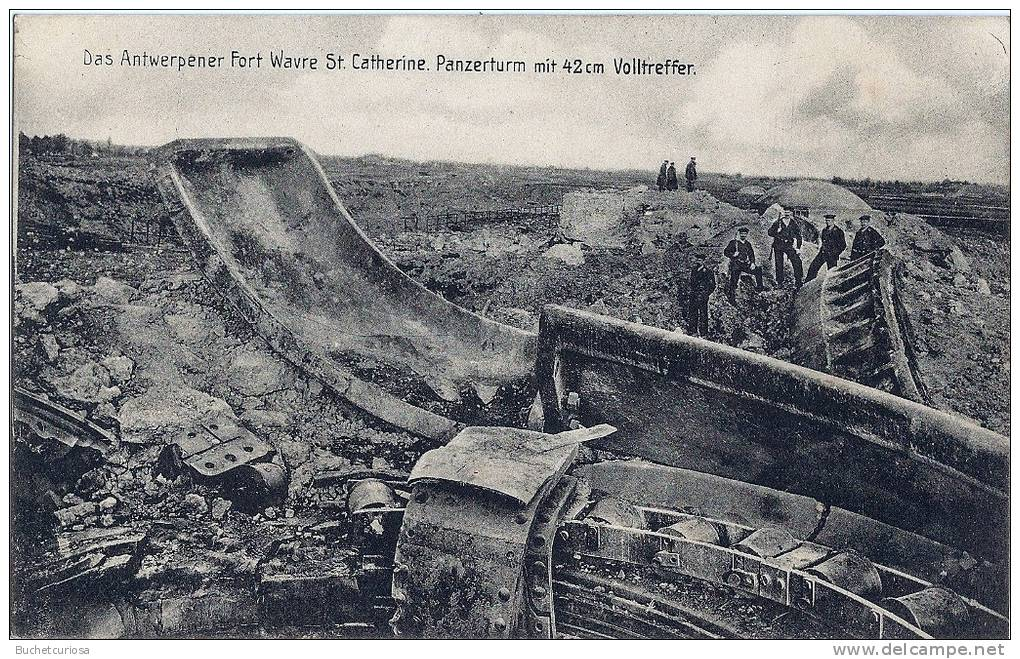 Разрушенная ударом тяжёлого немецкого орудия бронебашня антверпенского форта Вавр С.-Катрин